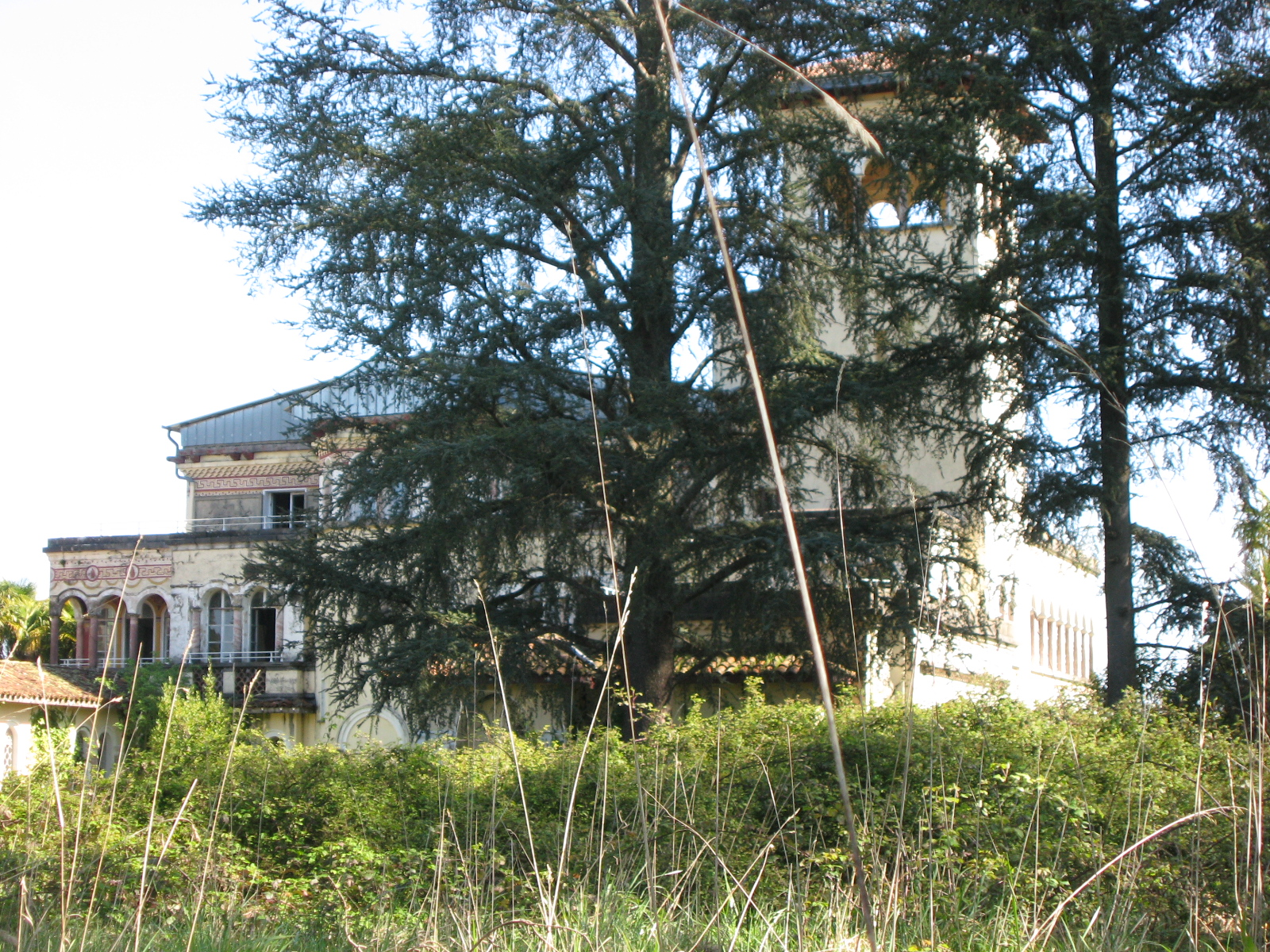 Chateau Bijou à Labastide-Villefranche (Pyrénées-Atlantiques) (Pyrénées).